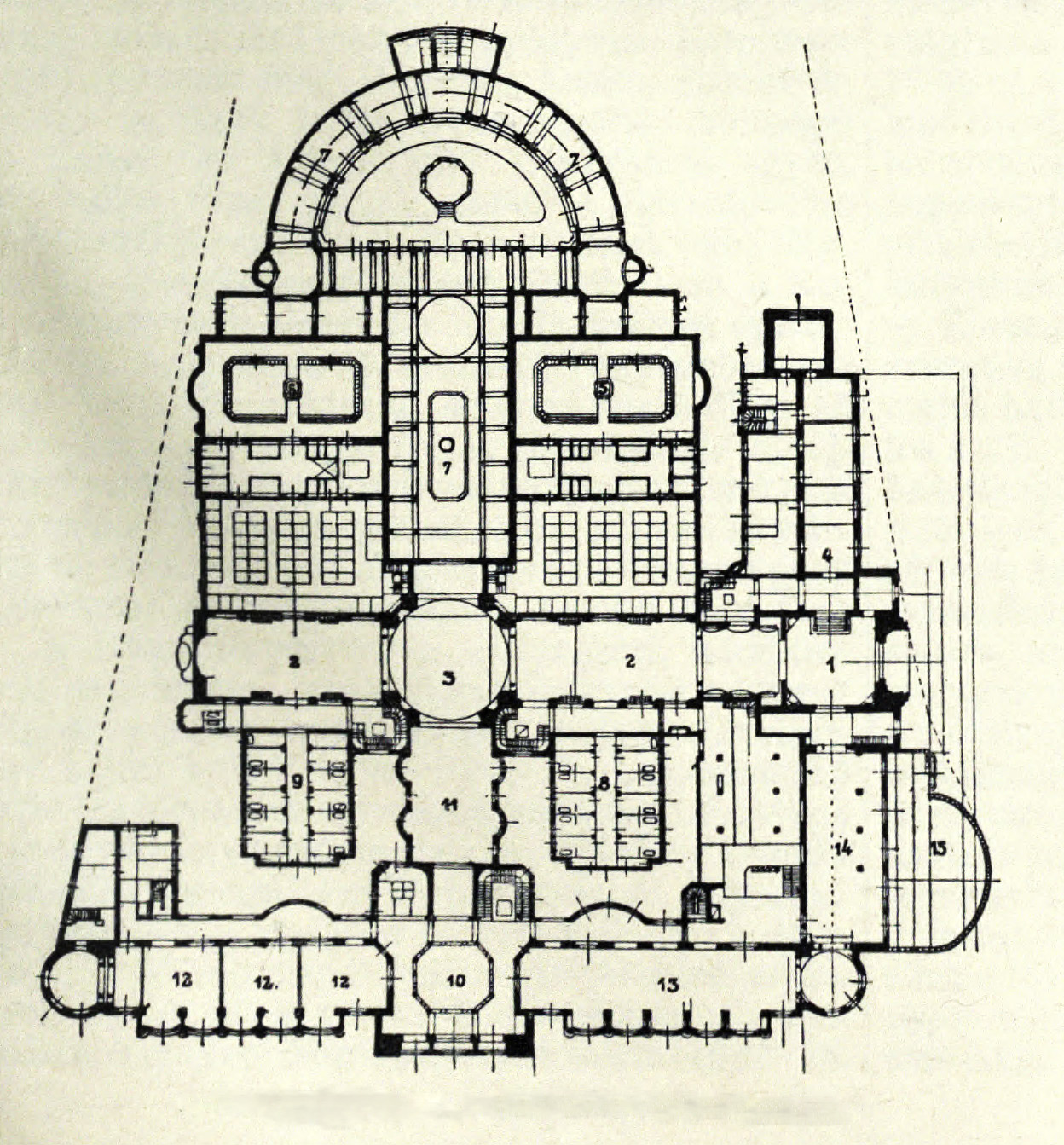 Grundriss des Gellértbades